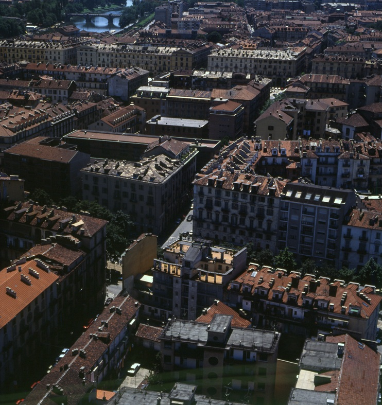 Fetta di Polenta dall'elicottero